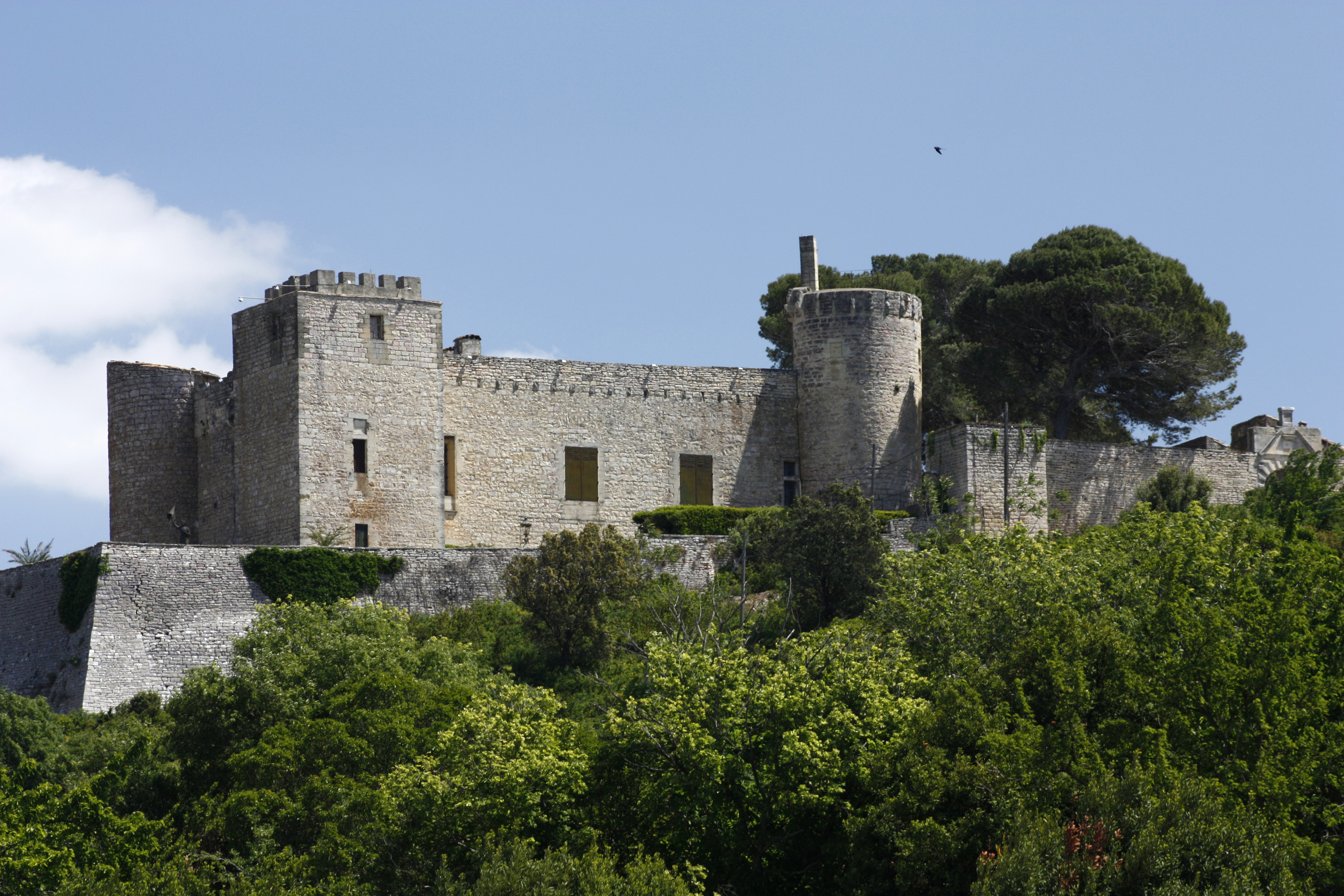 Castle of Boissières, Gard, Gard, Languedoc-Roussillon, France.